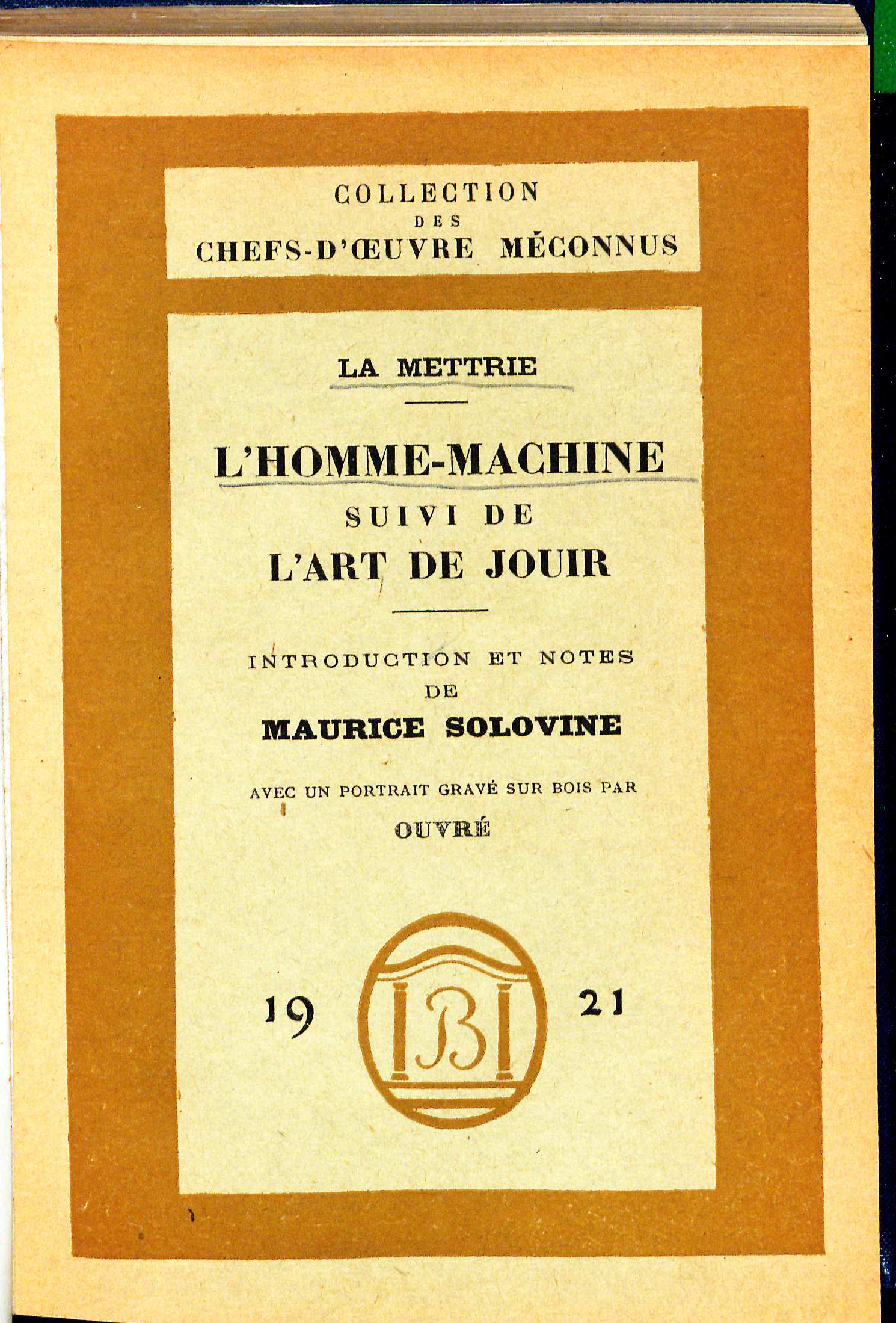 LaMettrie L'homme machine 1921. Introduction Maurice Solovine